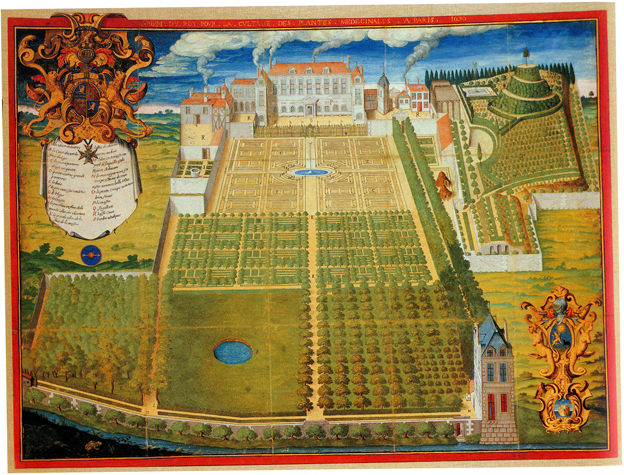 Vue cavalière du Jardin du Roi (entre la future rue du Jardin du Roy, actuellement rue Geoffroy St-Hilaire, et le canal des Victorins, disparu depuis longtemps). Aquarelle sur vélin peinte par Frédéric Scalberge en 1636.